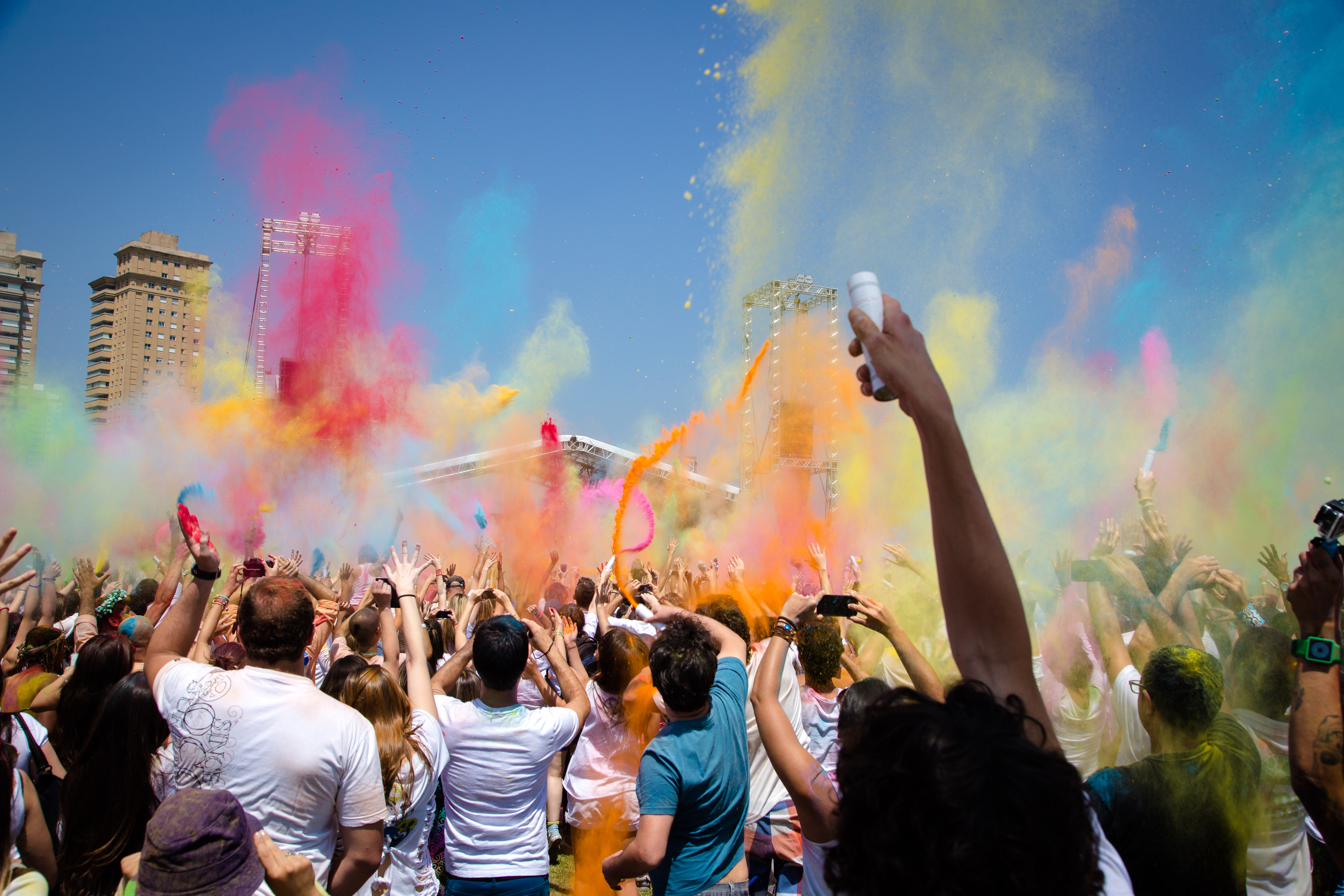 Parque villa lobos Holi festival 2013 Festival das cores, primavera verdi